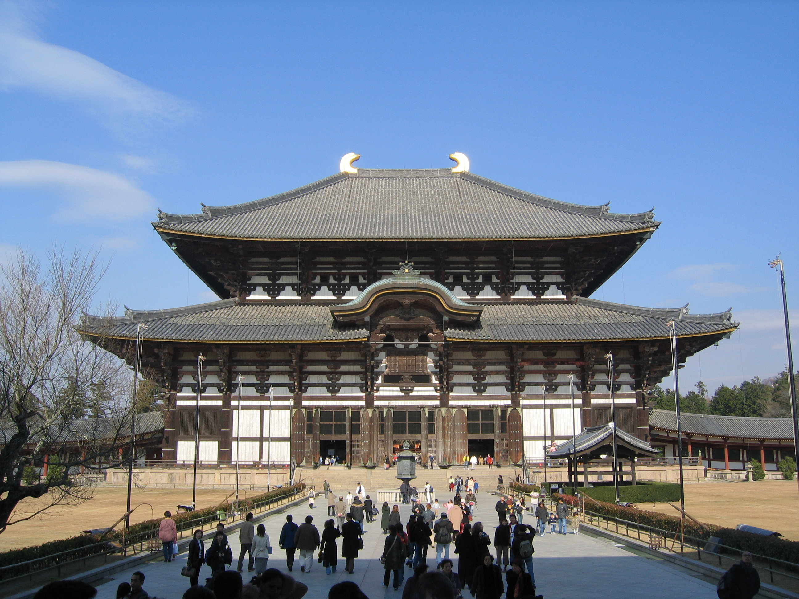 東大寺大仏殿